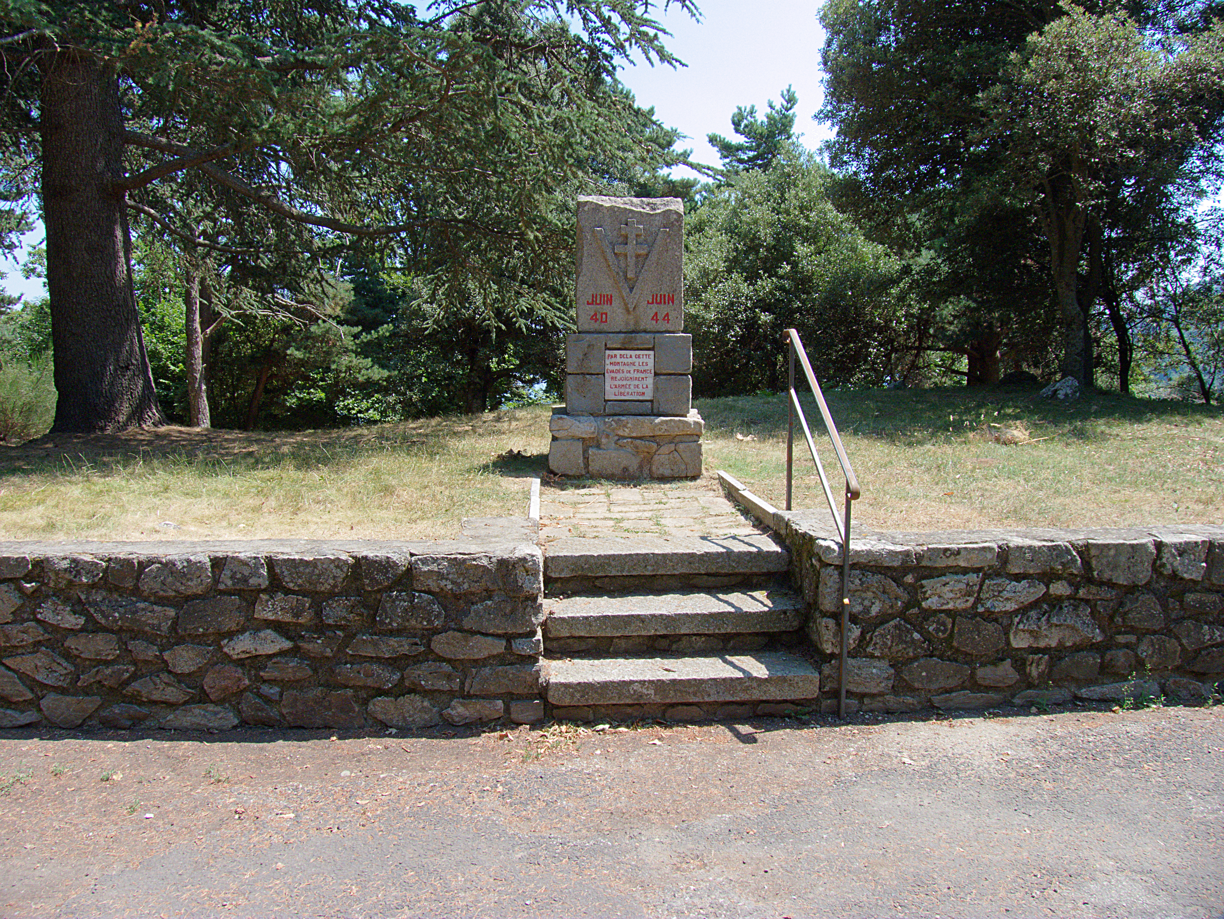 Stèles des Évadés de la Deuxième Guerre Mondiale, Col de Fontfrède, Céret (Pyrénées-Orientales, Languedoc-Roussillon, France)